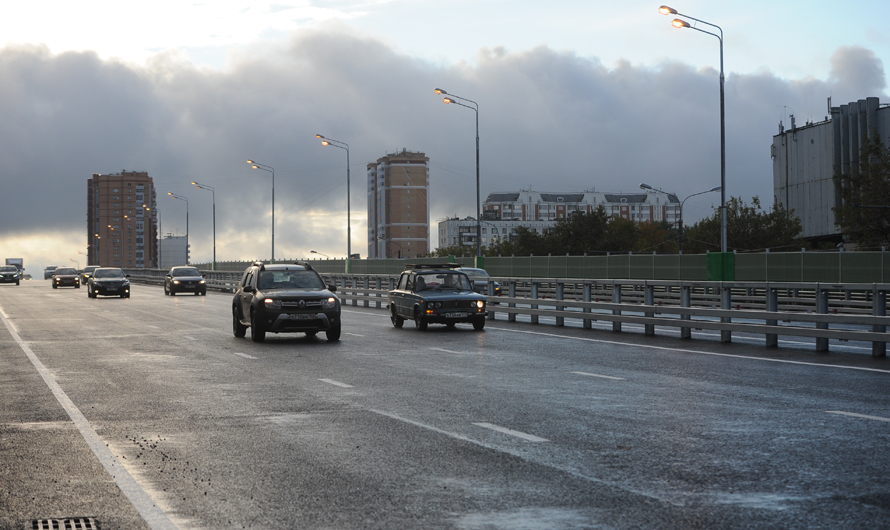 Эстакада на пересечении Щёлковского шоссе и 9-й Парковой улицы (сентябрь 2016).